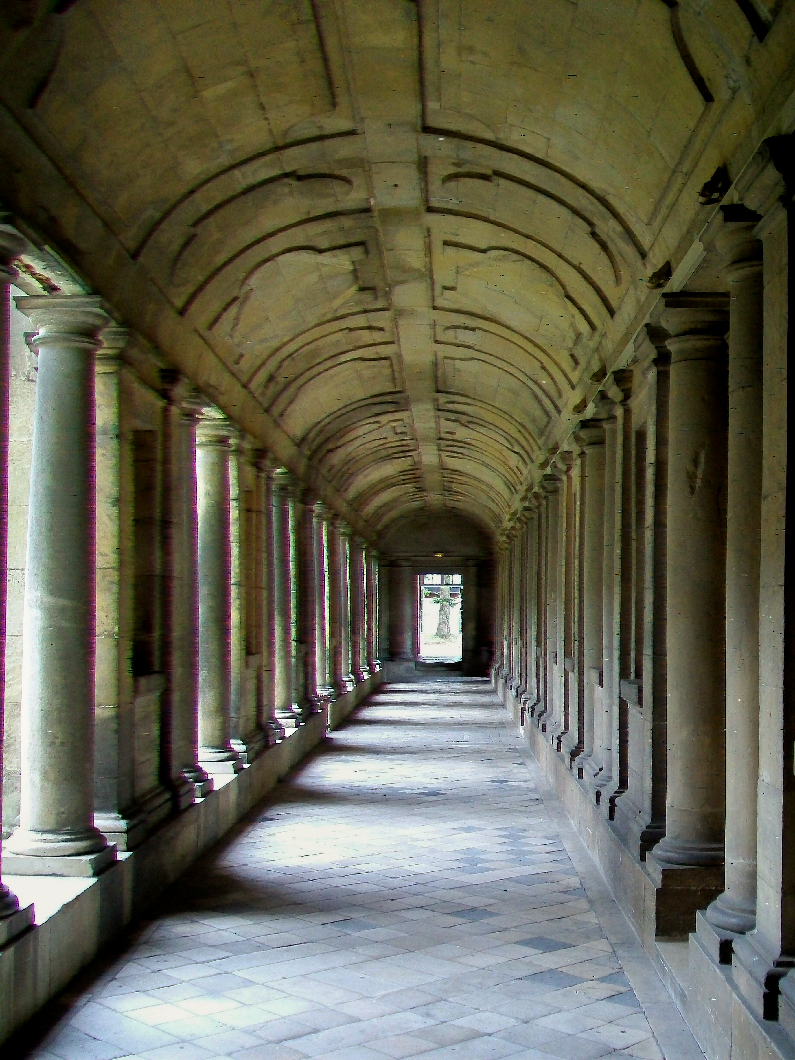 La galerie nord du cloître, parallèle à l'église.